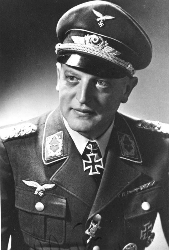 [eigenhändige Unterschrift:] Bauer, Oberstlt., 14.5.42